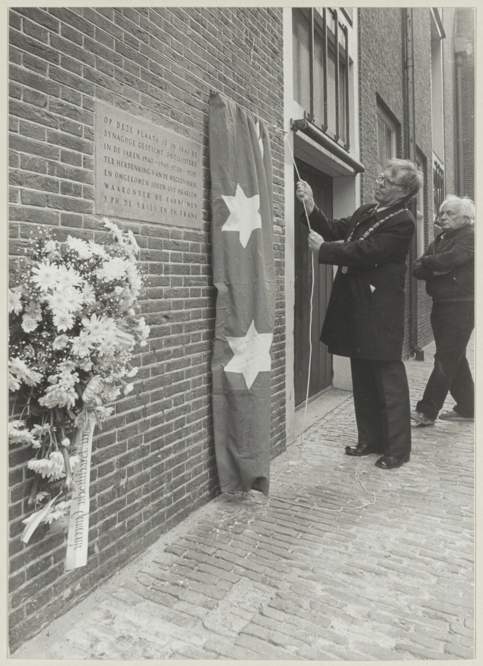 Burgemeester Reehorst onthult een gedenkplaat van de Haarlemse Joden die in W.O. II omkwamen, op de plaats van de voormalige Synagoge hoek Lange Begijnestraat en Wijde Appelaarsteeg.